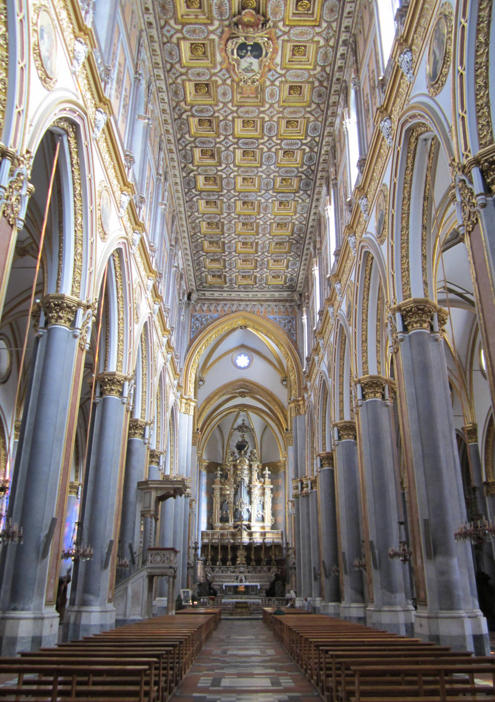 Interno della Chiesa di San Domenico Maggiore a Napoli